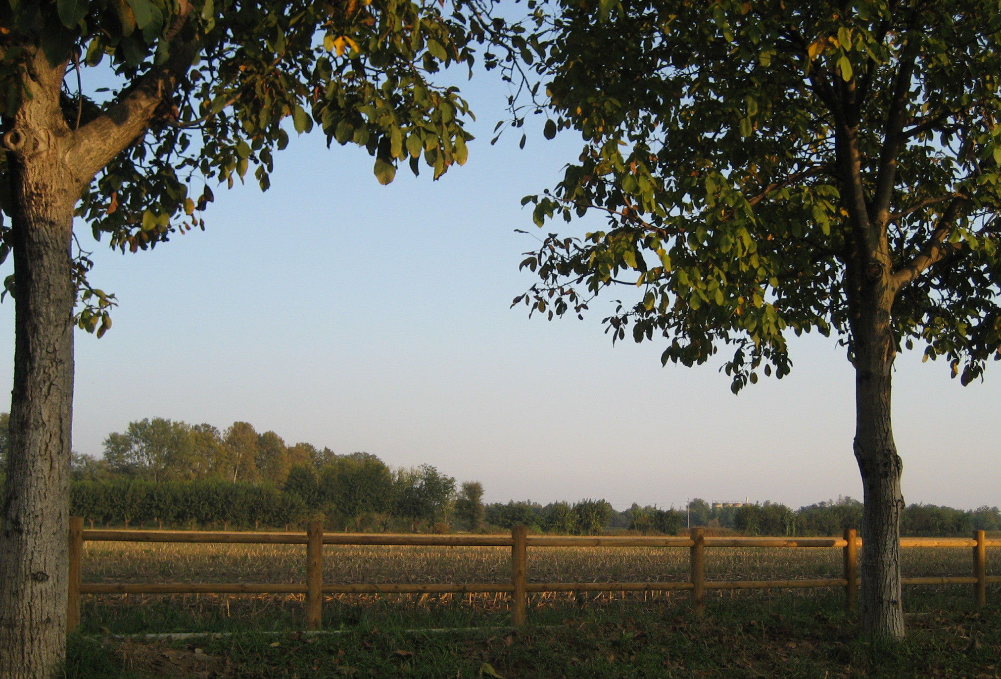 Campagna castelmellese vista dal Borgo di Onzato